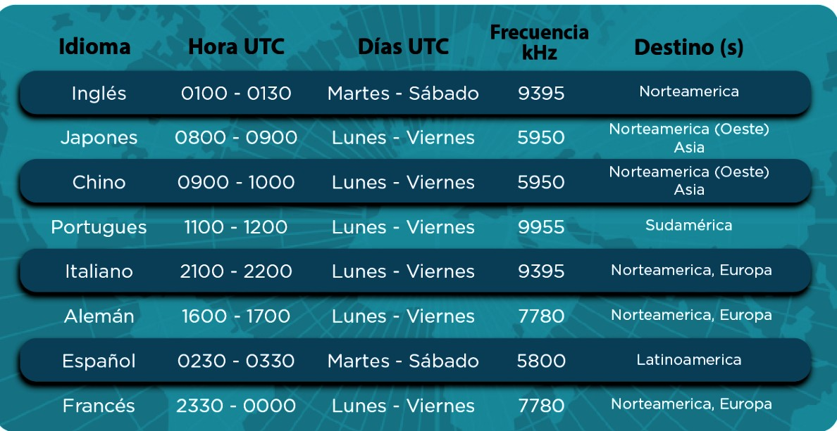 Frecuencias onda corta